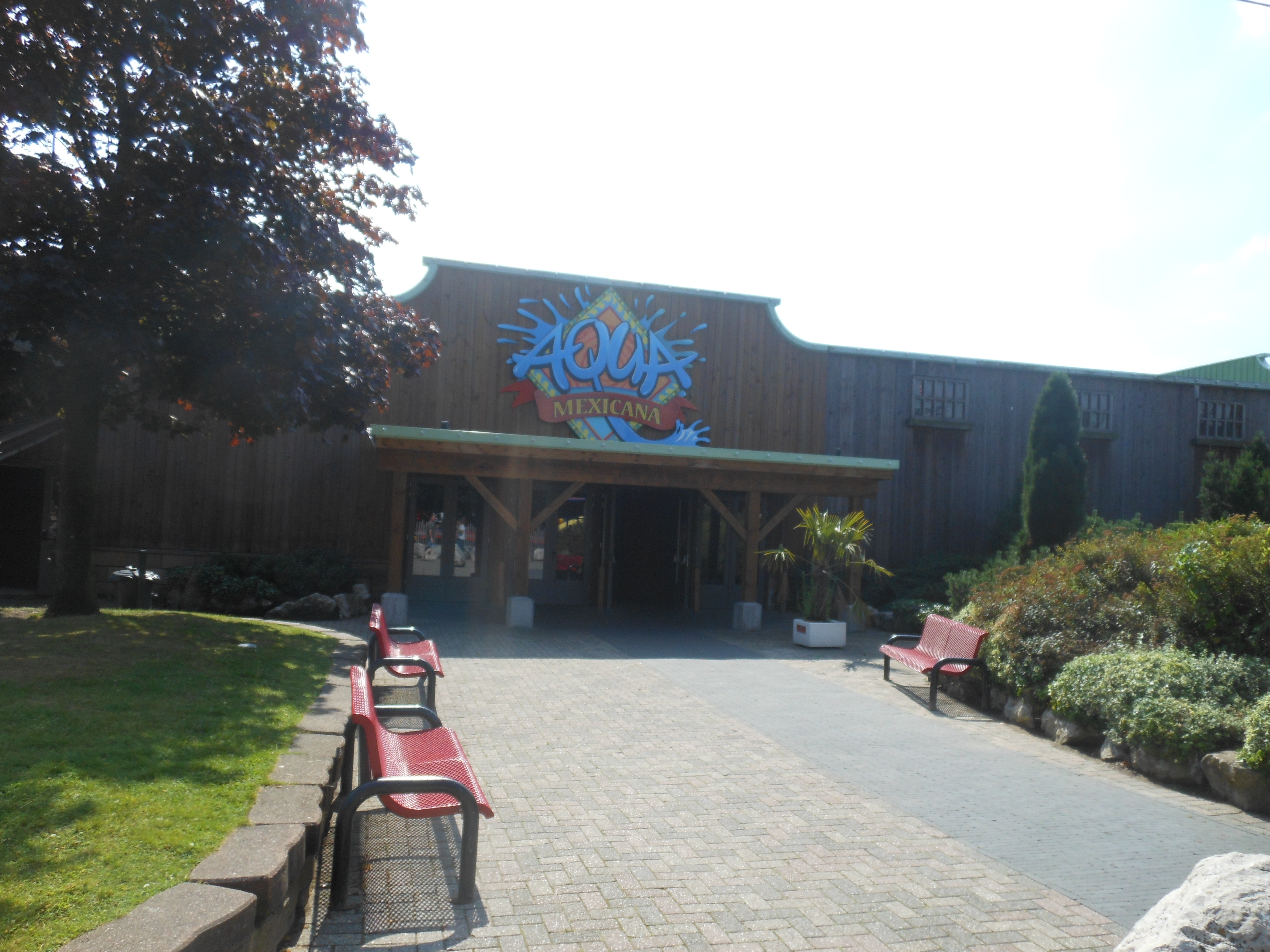 De ingang van Aqua Mexicana, het in 2015 geopende zwemparadijs van Vakantie- & Attractiepark Slagharen in Overijssel, Nederland. Aqua Mexicana kan niet betreden worden zonder door het attractiepark te passeren.